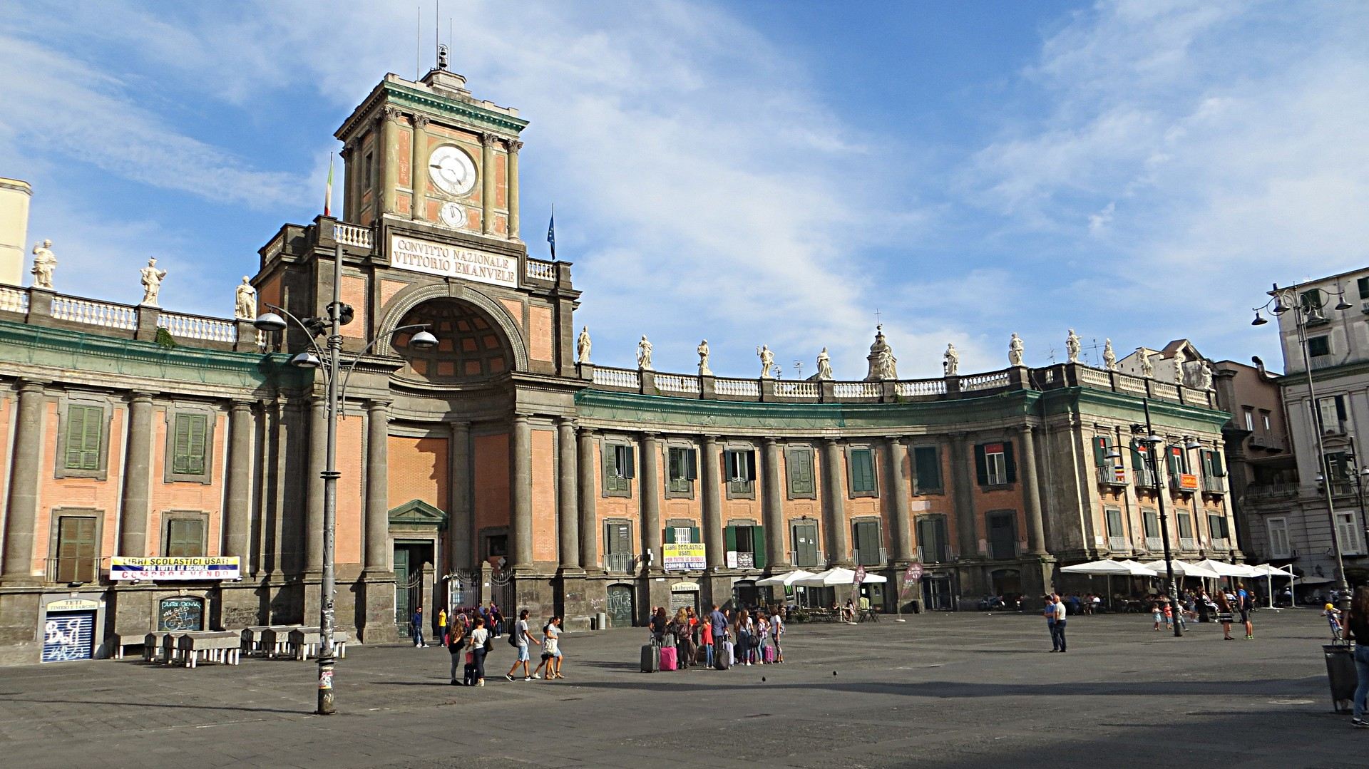 Piazza Dante Alighieri